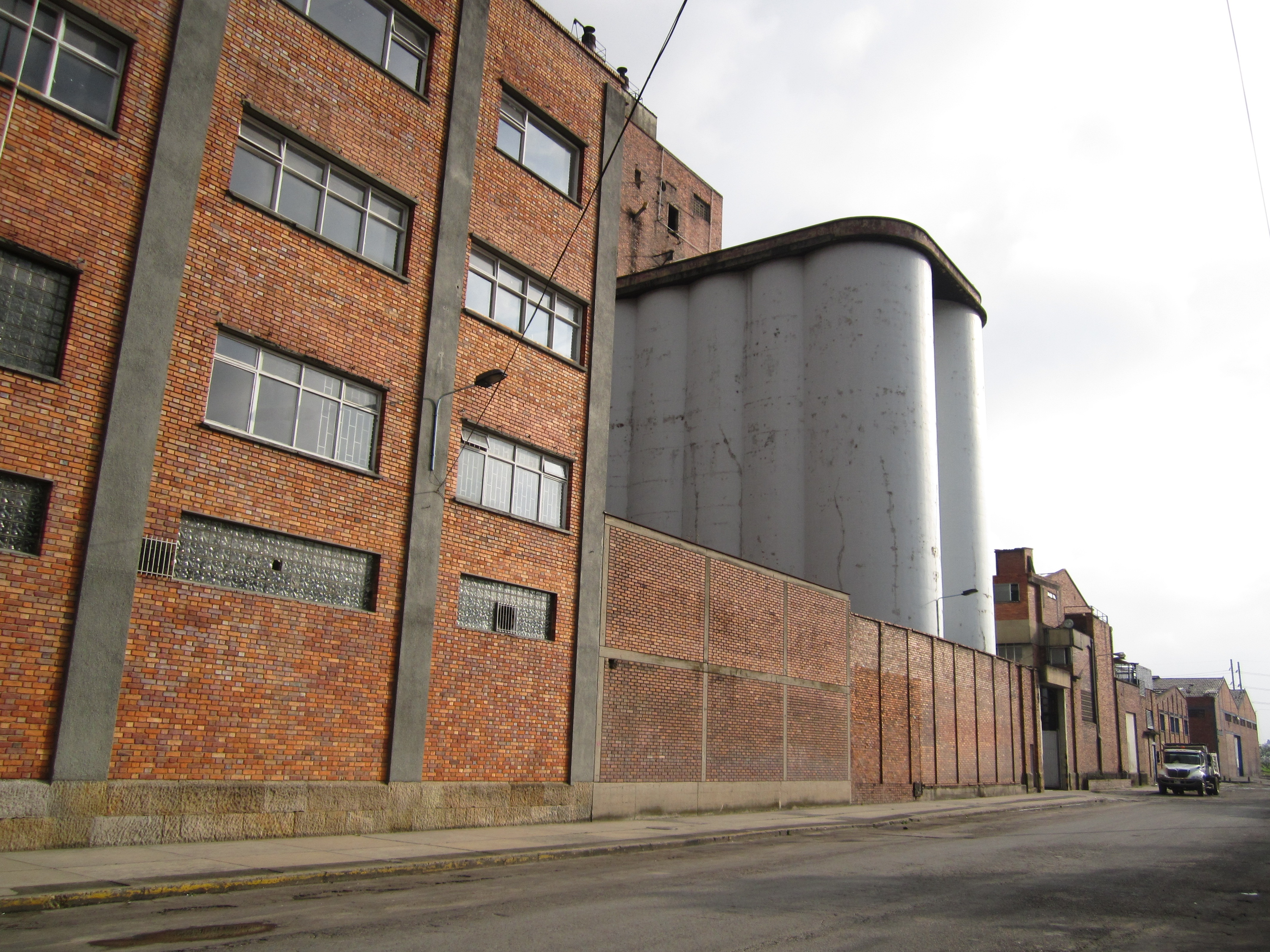 Fábrica de Cervezas Andina, localidad de Puente Aranda. Calle 22b con carrera 32, Bogotá.